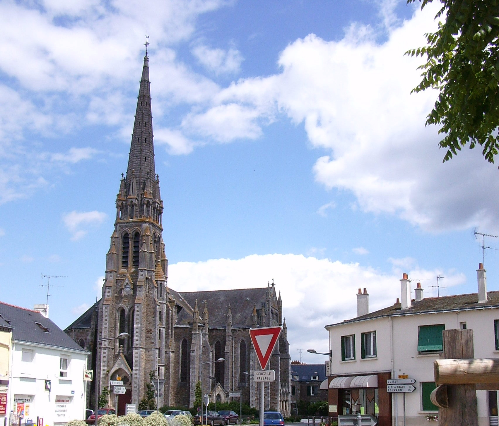 Die Kirche von Guenrouët, Pays de la Loire, Frankreich